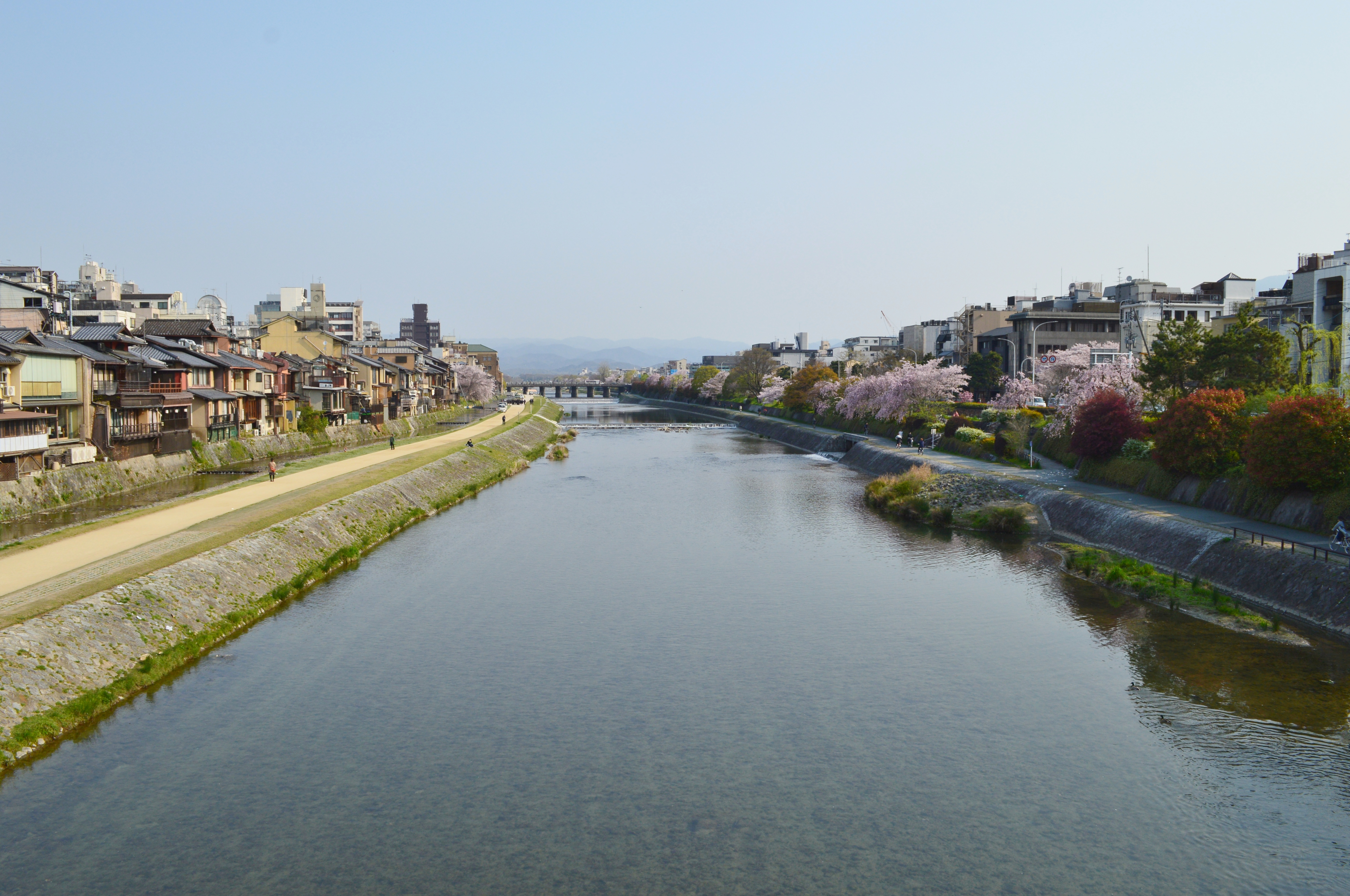 四条大橋から鴨川上流を望む